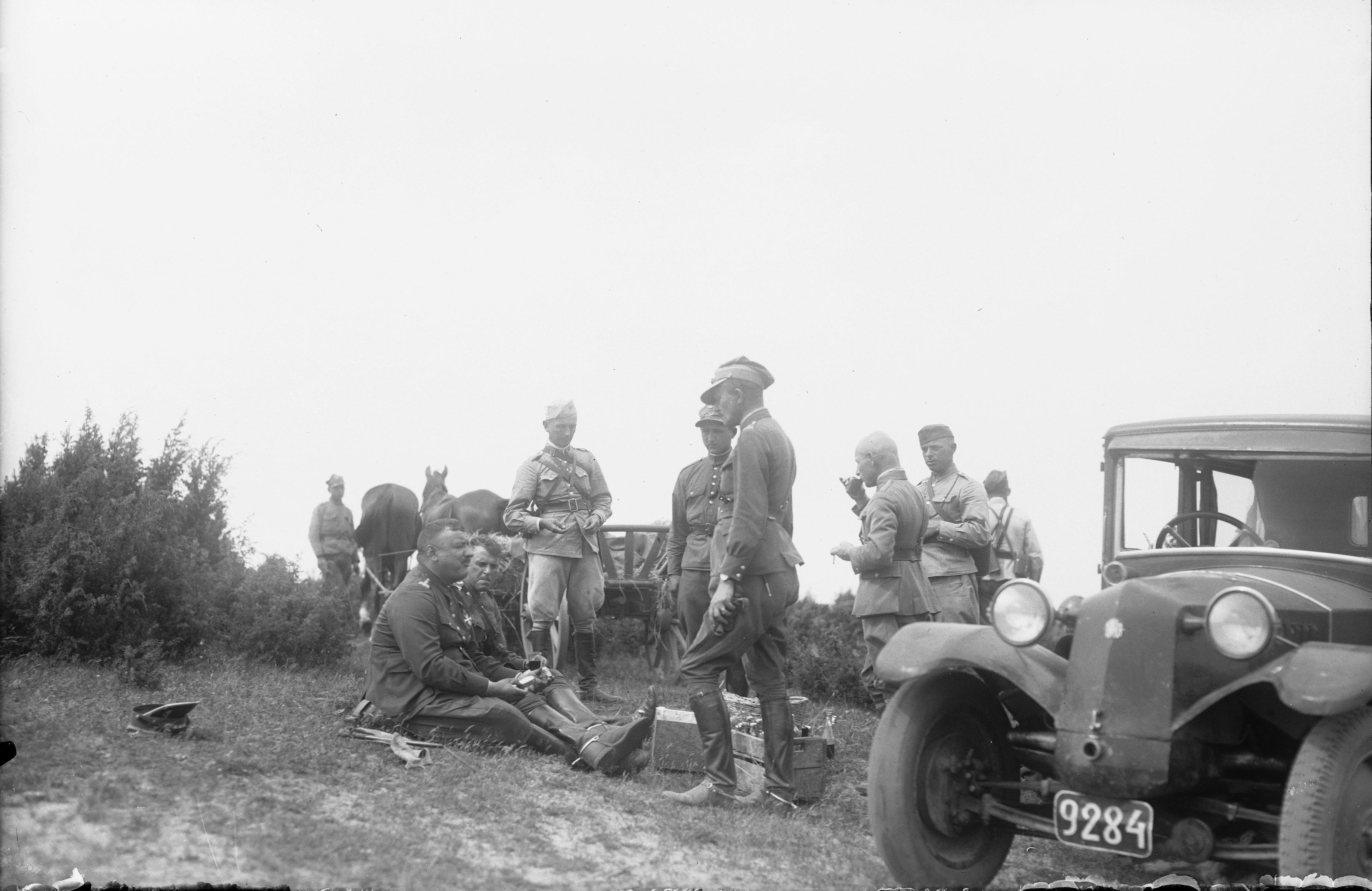 Oficerowie podczas posiłku - siedzi 1. z lewej płk Adam Zakrzewski.